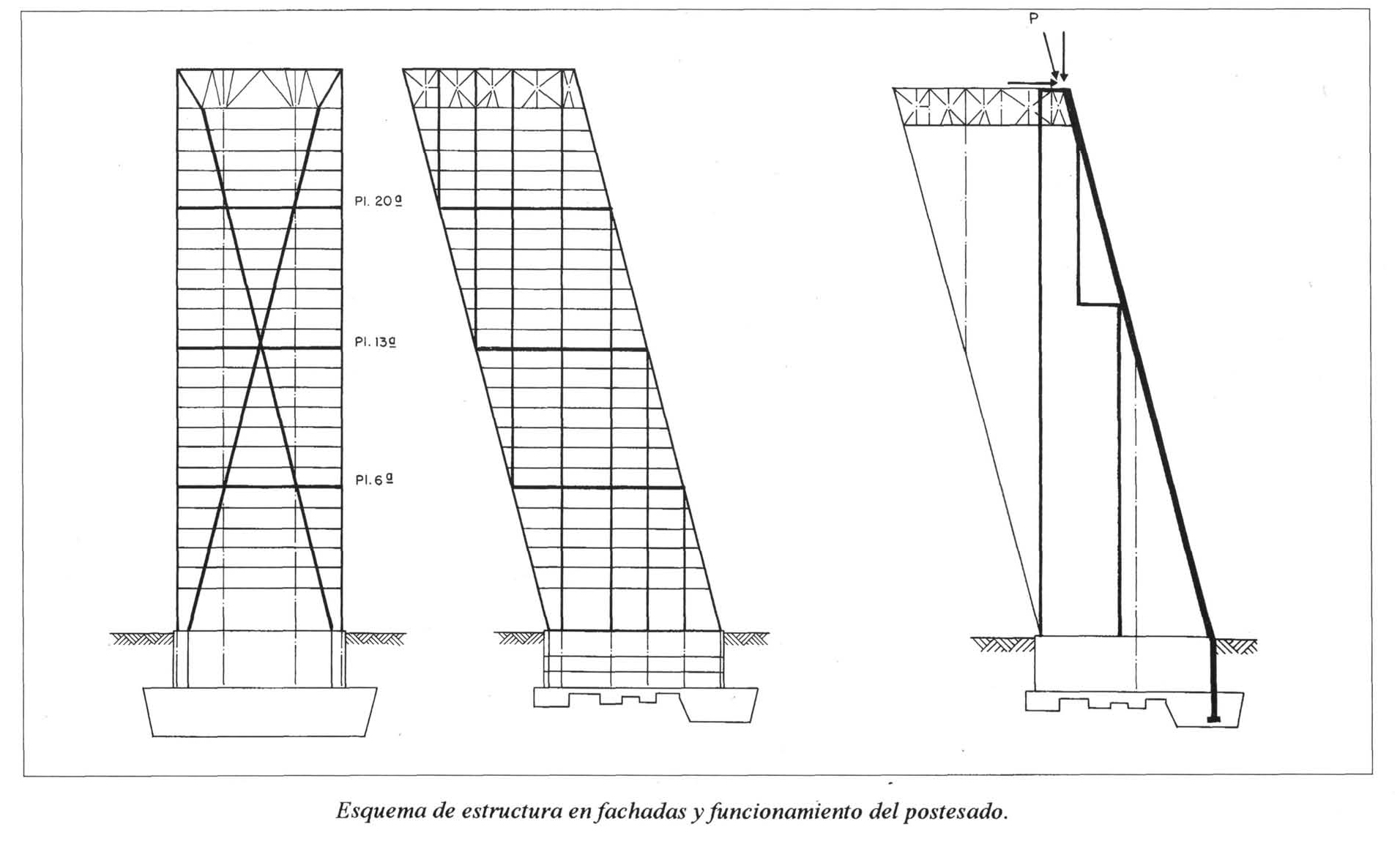 Esquema de estructura en fachadas y funcionamiento del postesado. Torres de Europa.